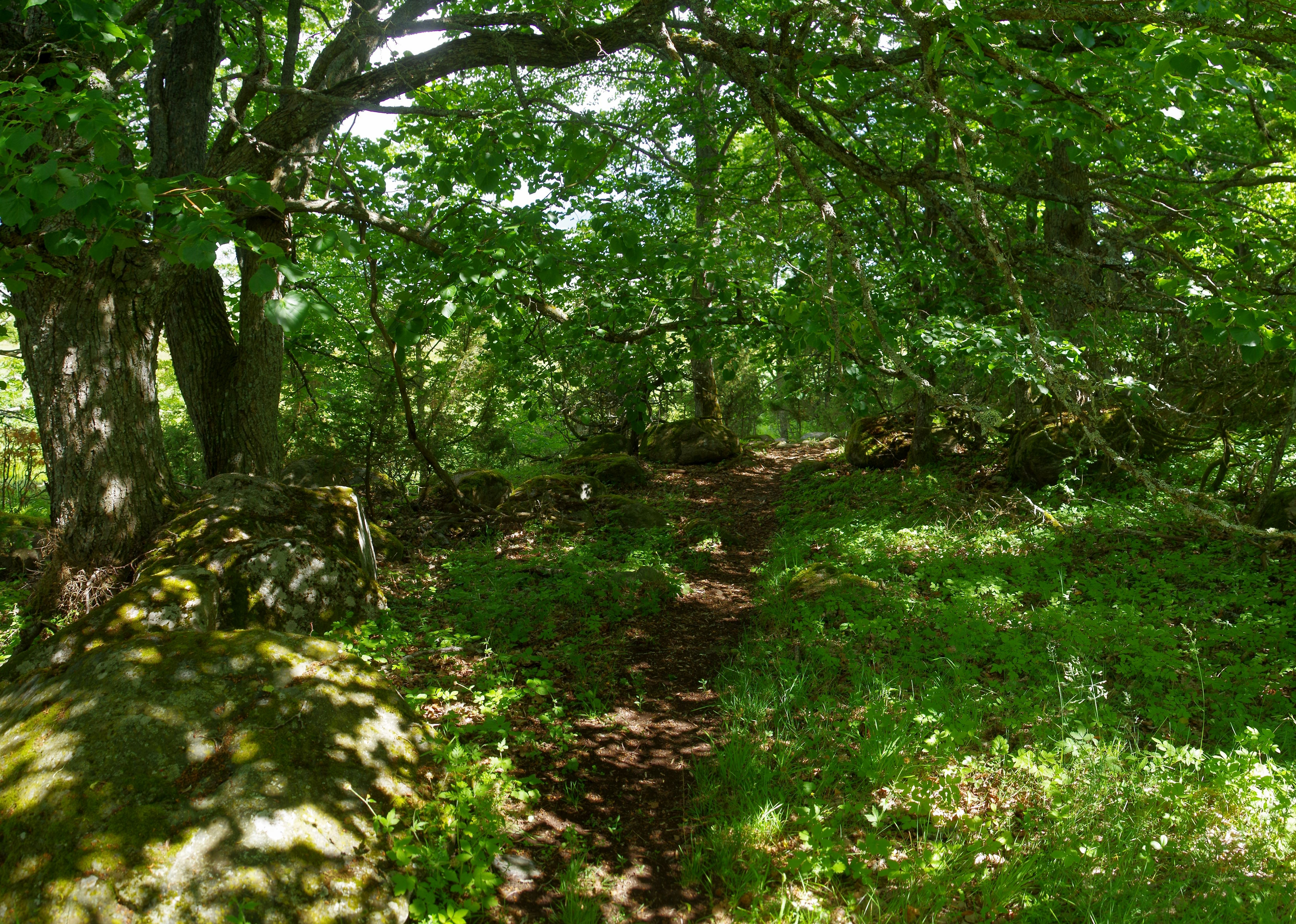 Saarnaki laid on ligikaudu 140 hektari suurune laid Väinameres Hiiumaast kagus Salinõmme küla territooriumil. Saar kuulub Hiiumaa laidude maastikukaitseala laidude sihtkaitsevööndisse. Pärnamäeränk asub laiu idarannikul.